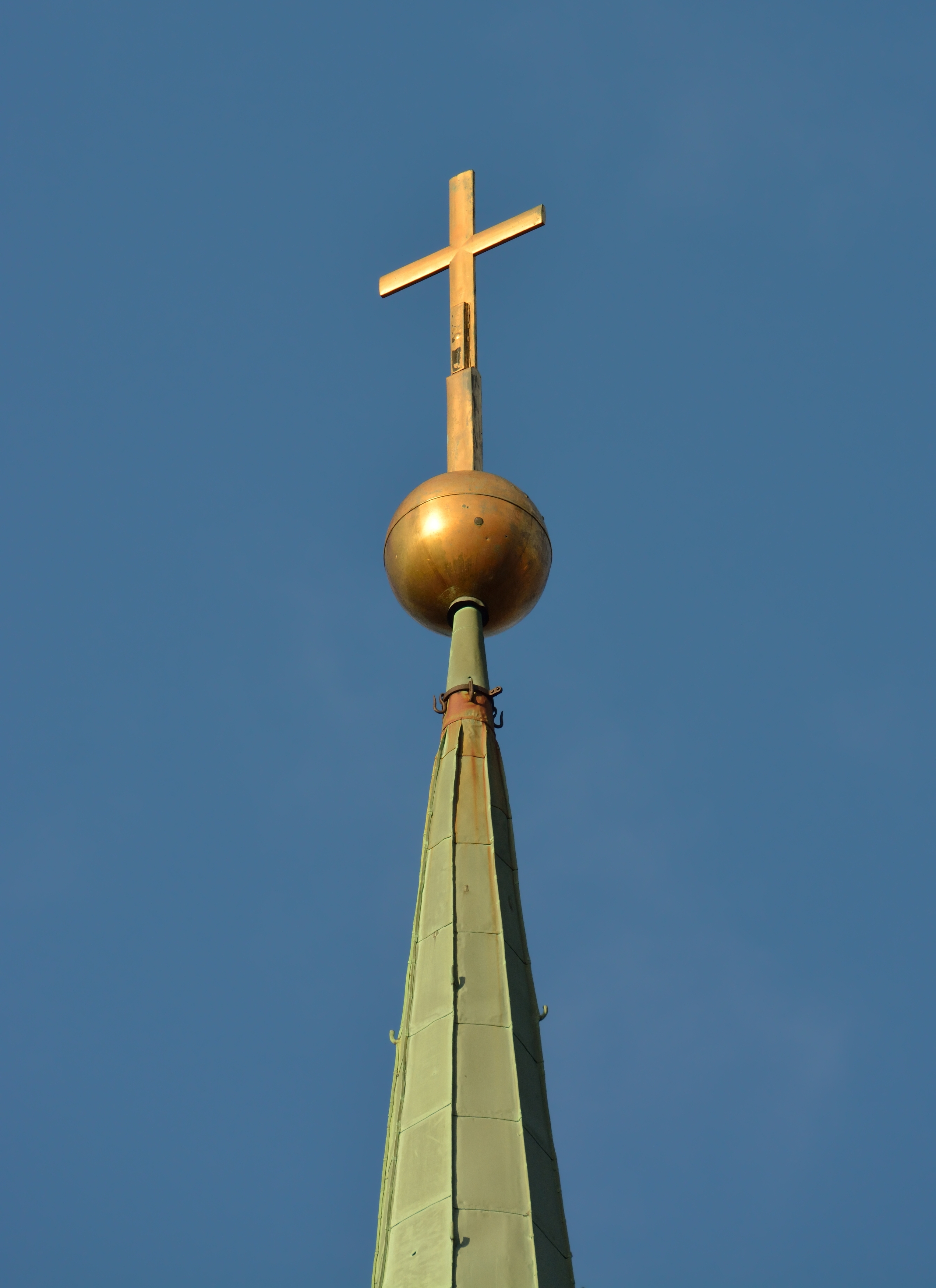 Tallinna Oleviste kirikutorni muna ja rist